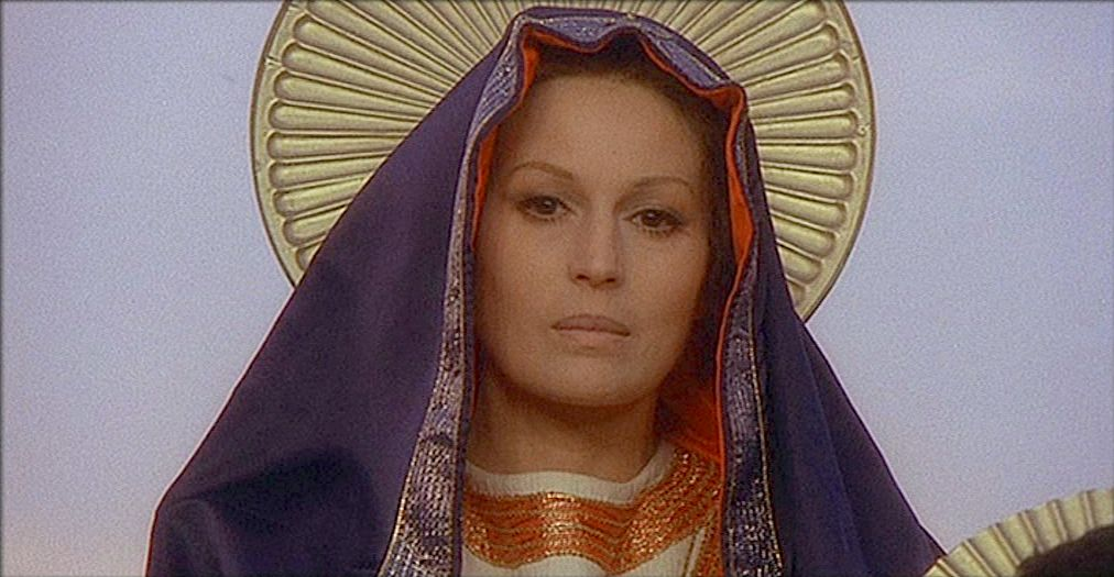 Screenshot del film Il Decameron (1971).